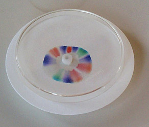 Papier-Chromatographie